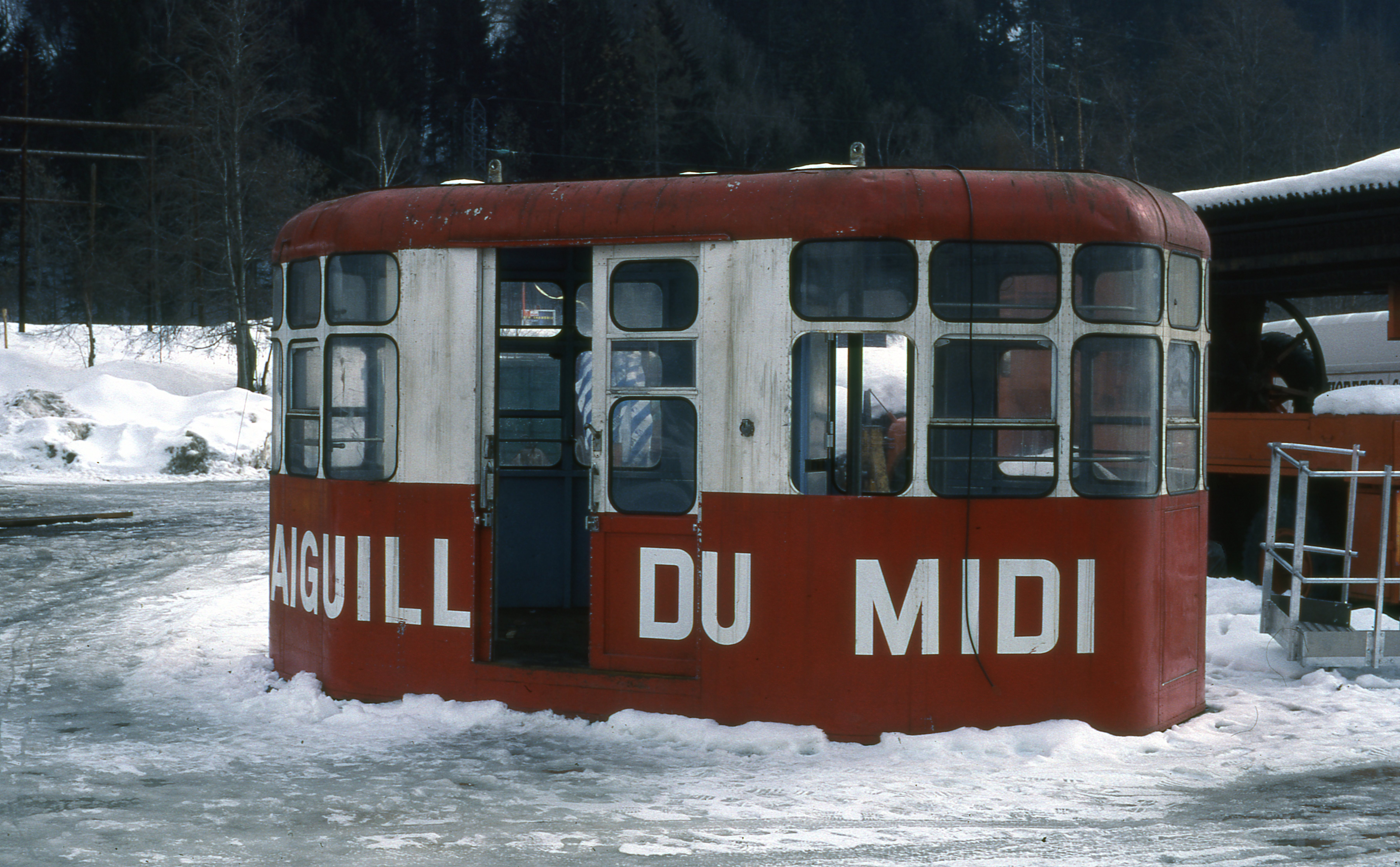 Chamonix-Mont-Blanc : ancienne cabine du téléphérique